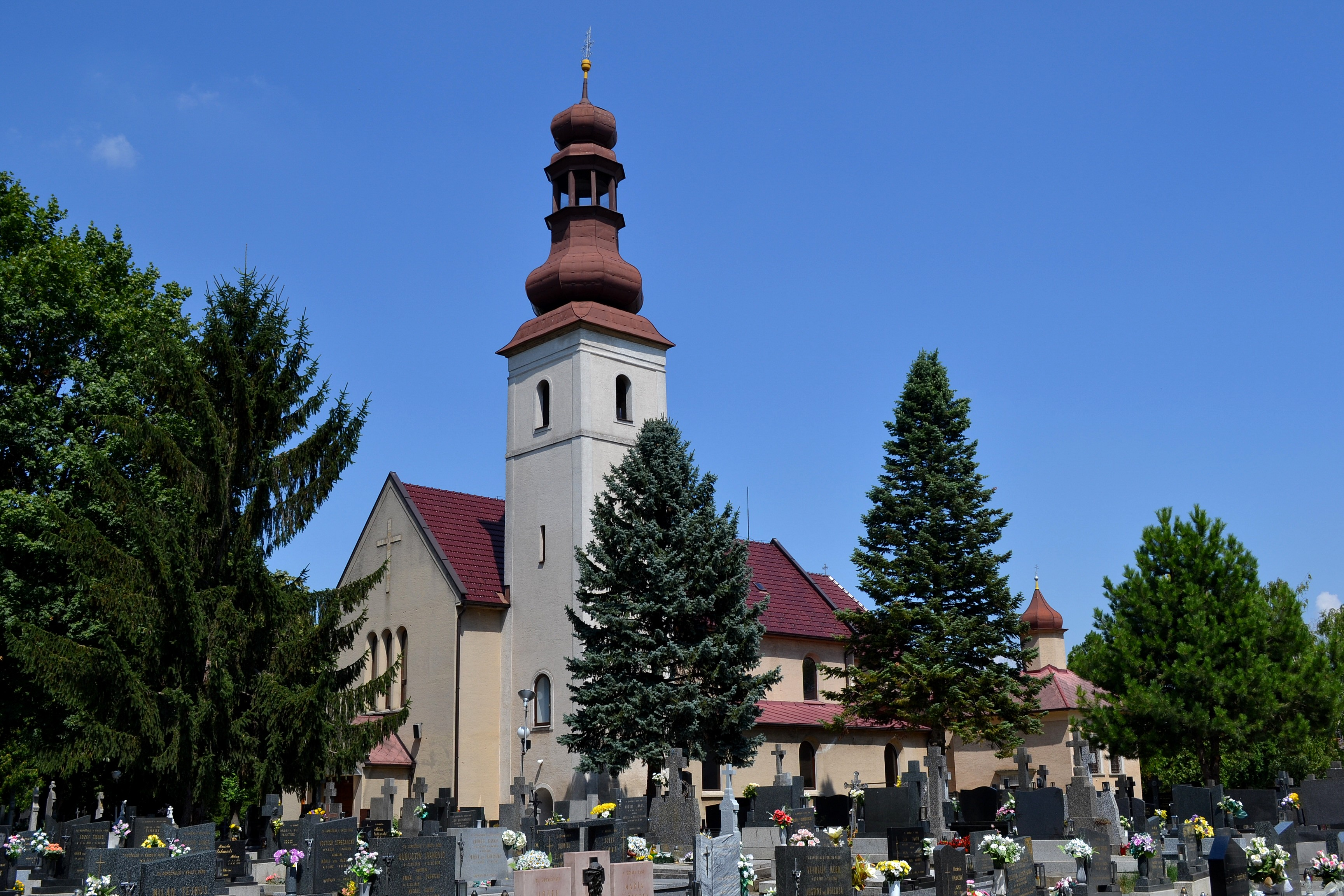 Špačince (okr. Trnava), Kostol Narodenia Panny Márie